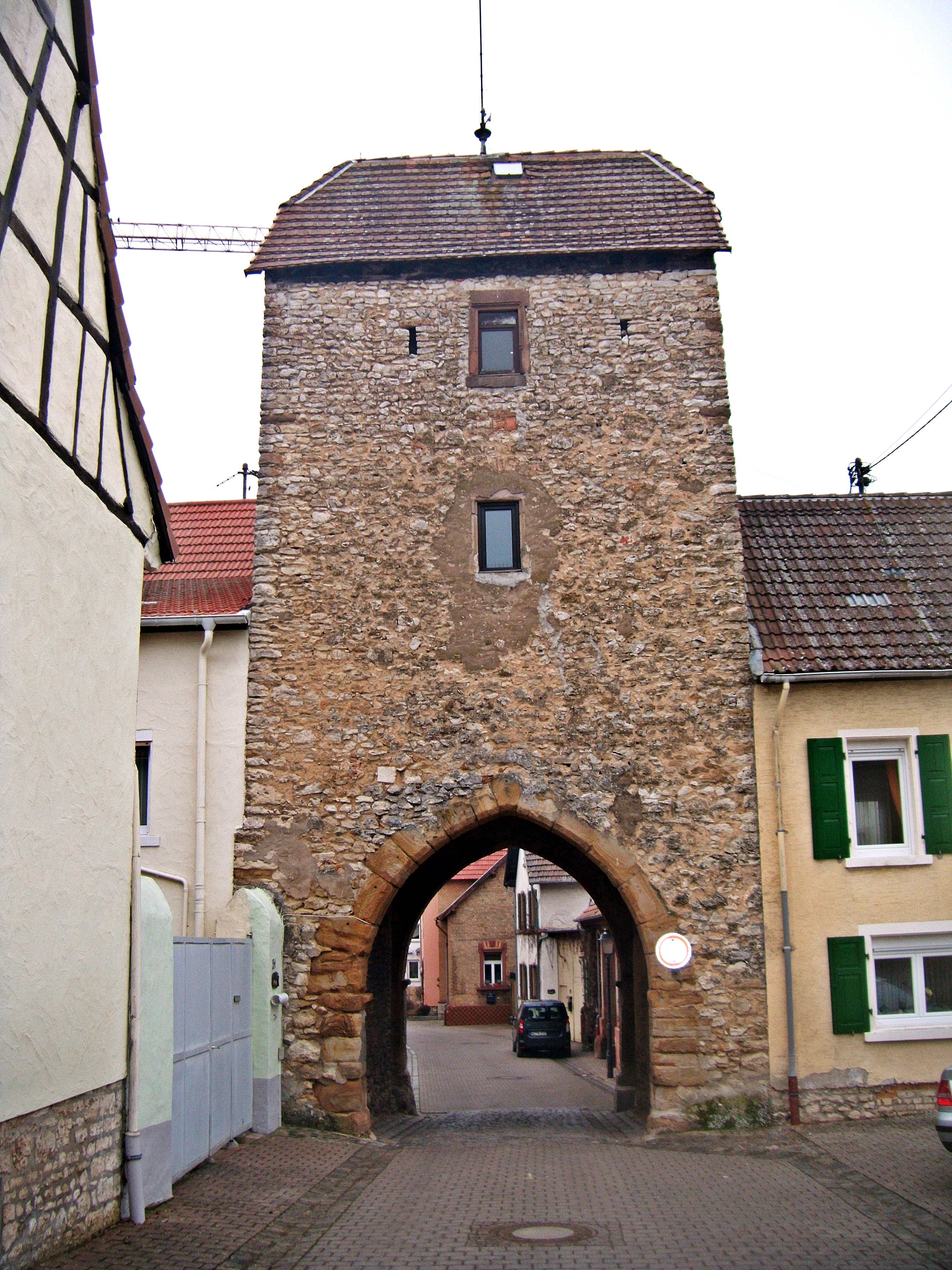 Oberflörsheim Torturm